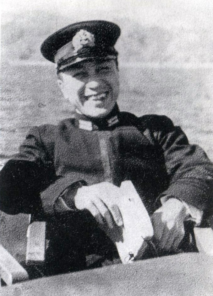 Tomonaga Hideo is an Imperial Japanese Navy Captain